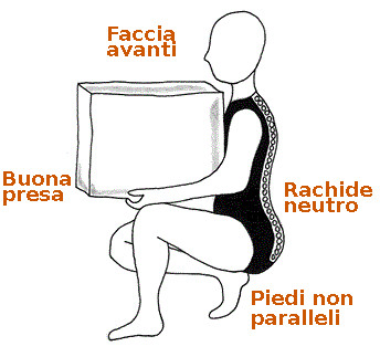 Sollevamento di carichi pesanti